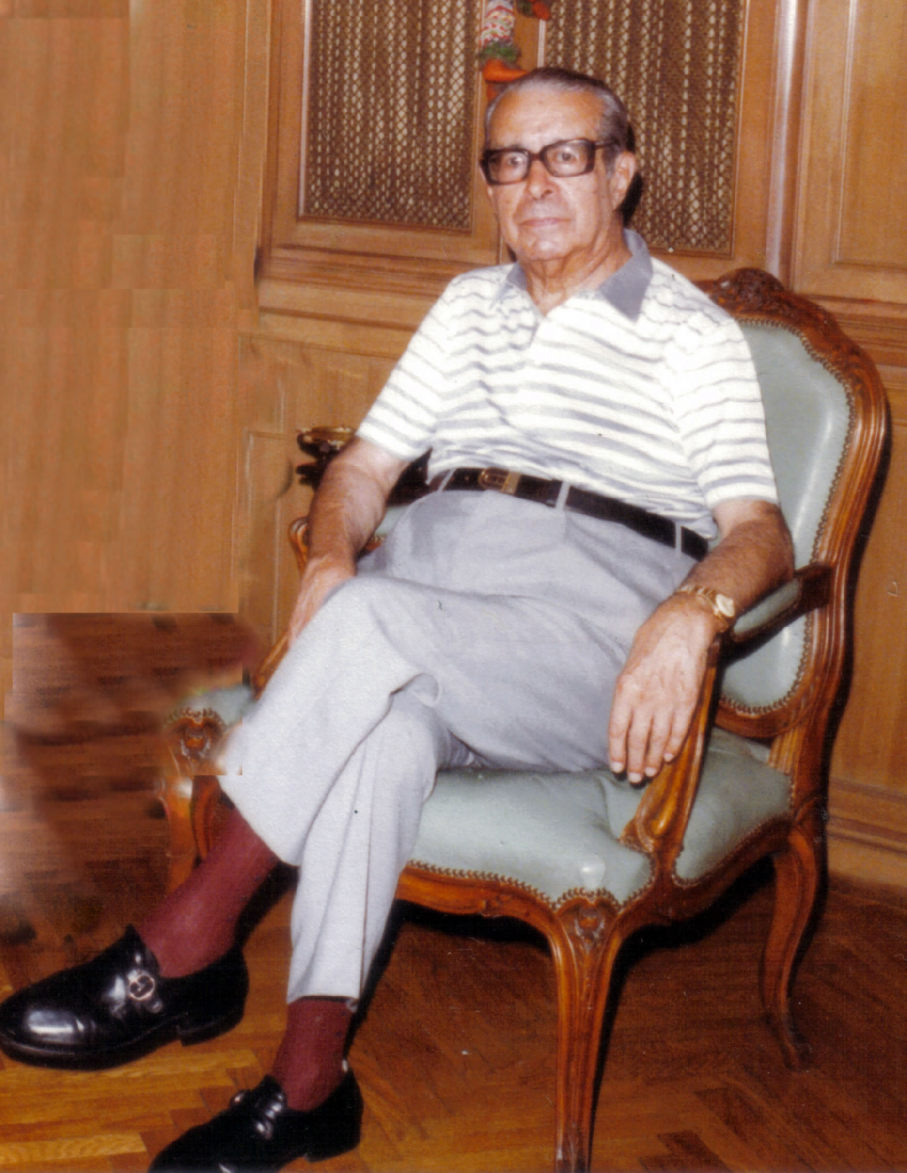 Fotografía de Antonio J. Benitez